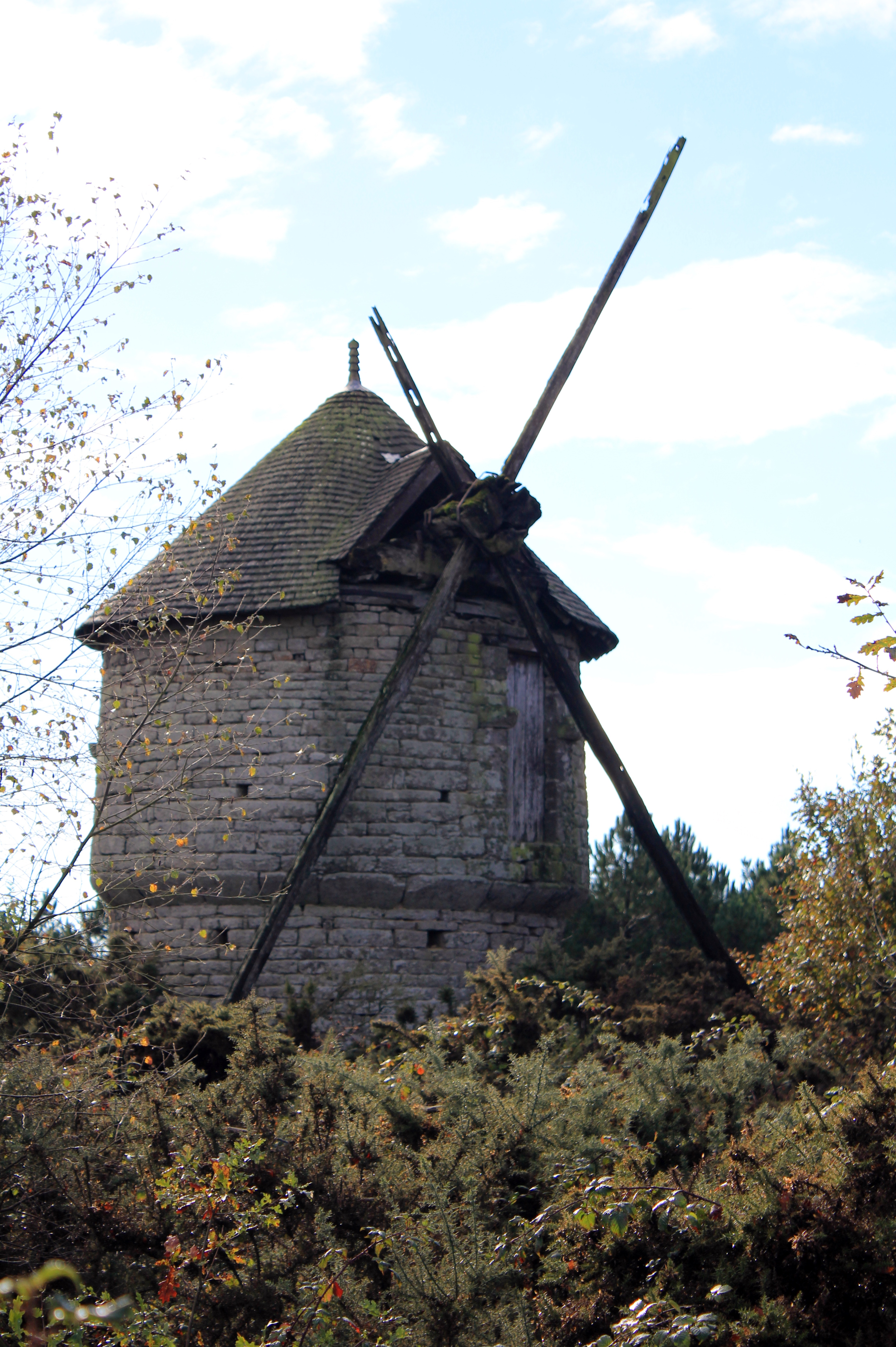 Moulin à vent des Timbrieux .